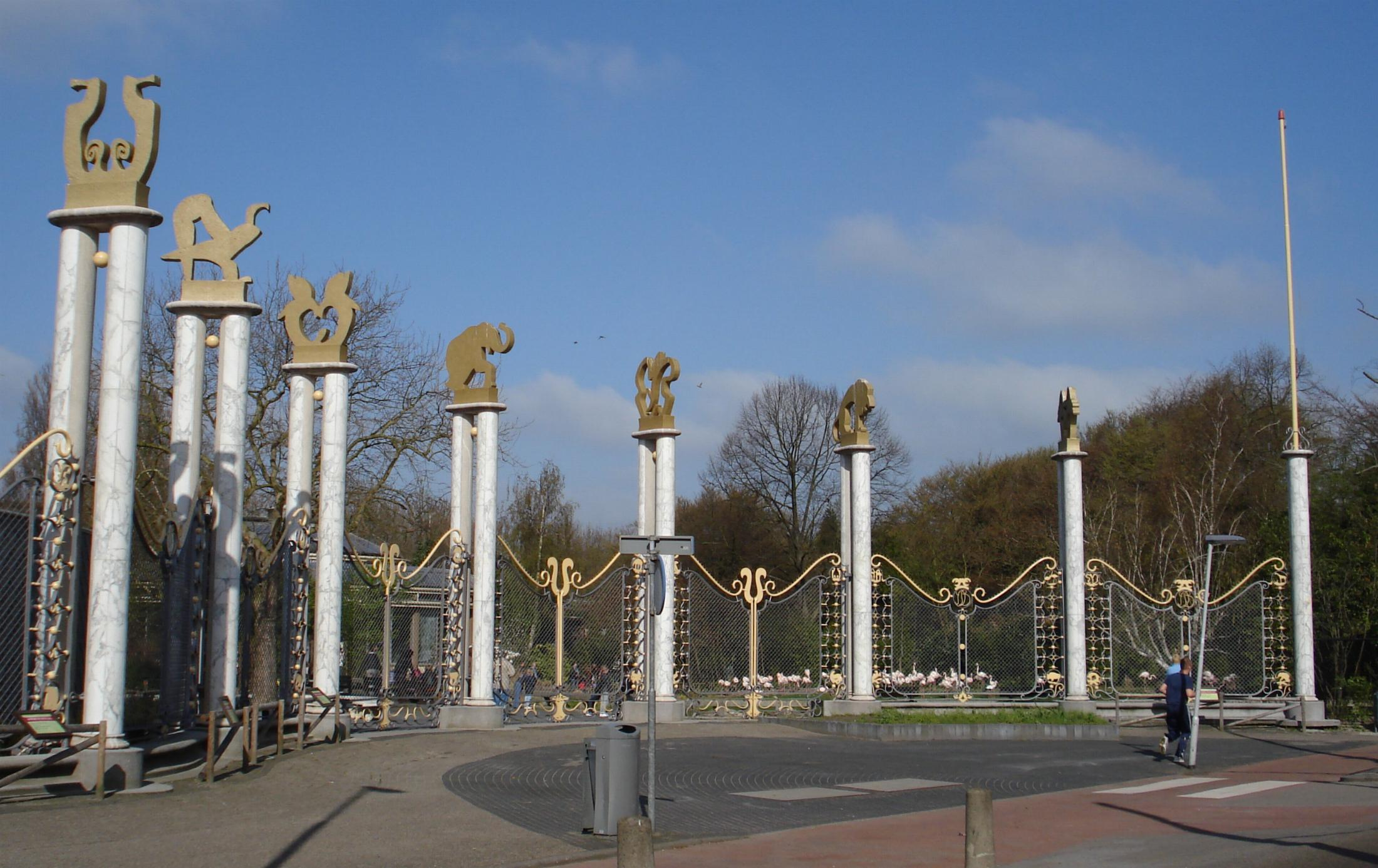 Rotterdam, diergaarde Blijdorp. Toegangshek. Rijksmonument.